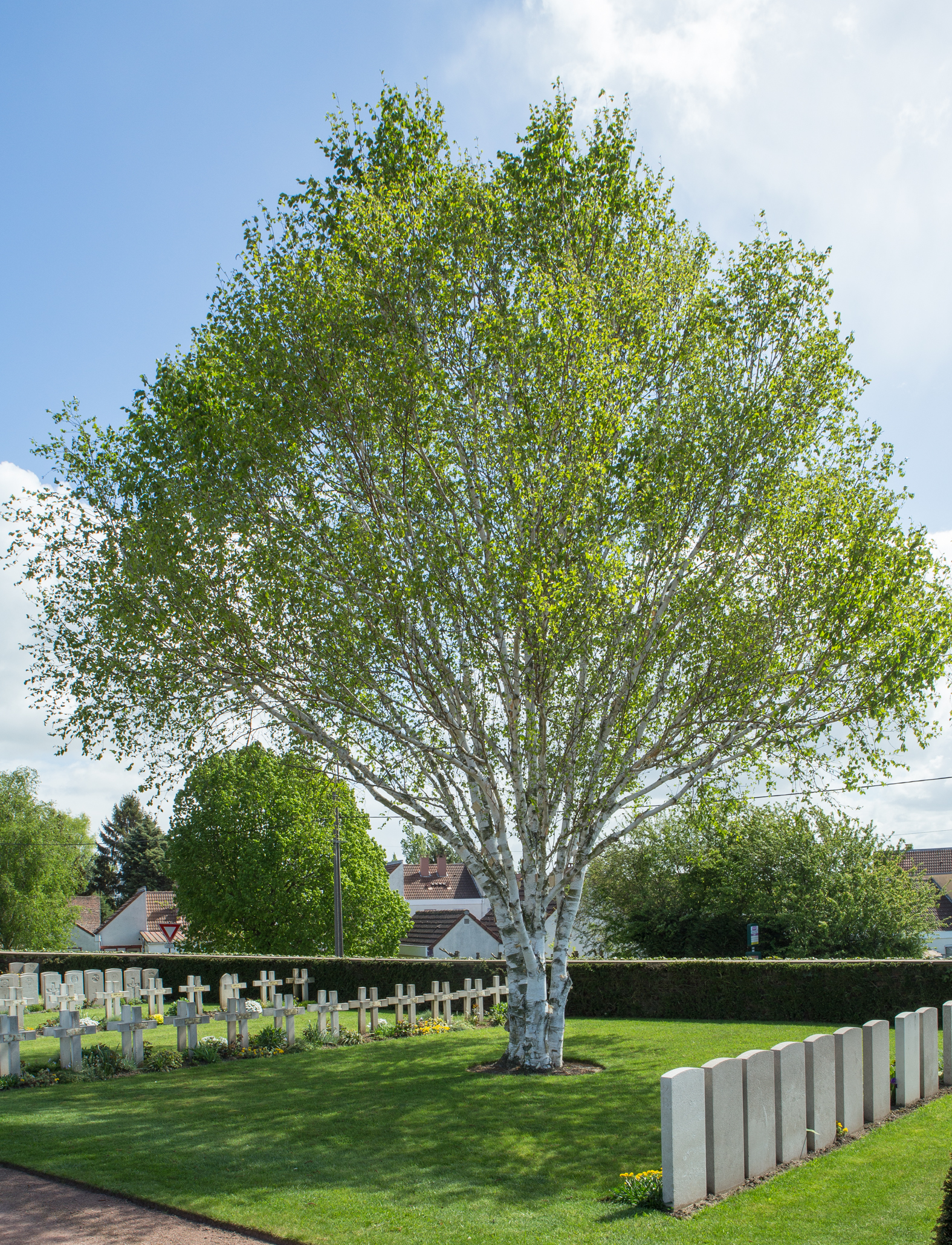 Bethune Town Cemetery